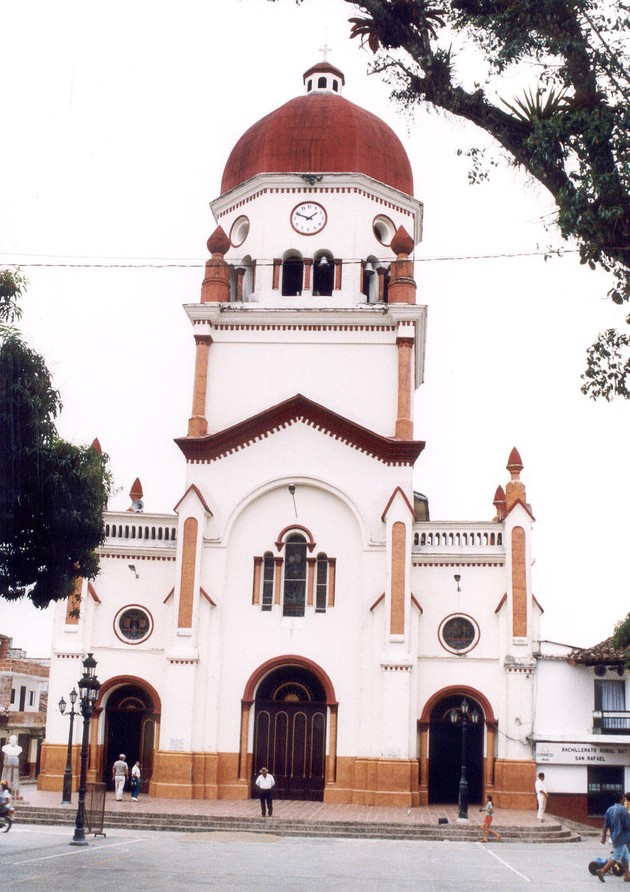 Iglesia de San Rafael Arcángel, en San Rafael.